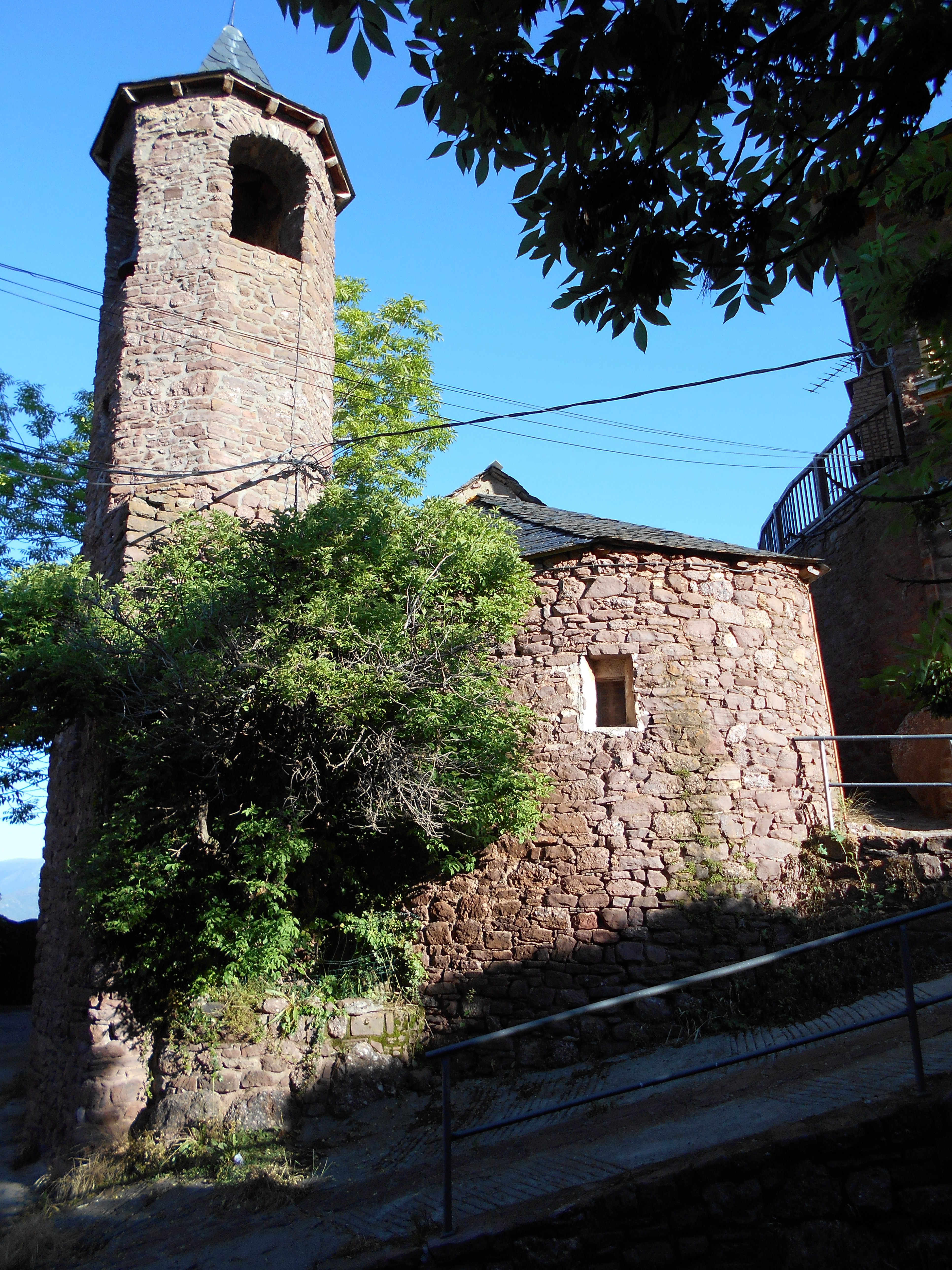 L'église SainMartin-de-Llagunes. Abside et clochert